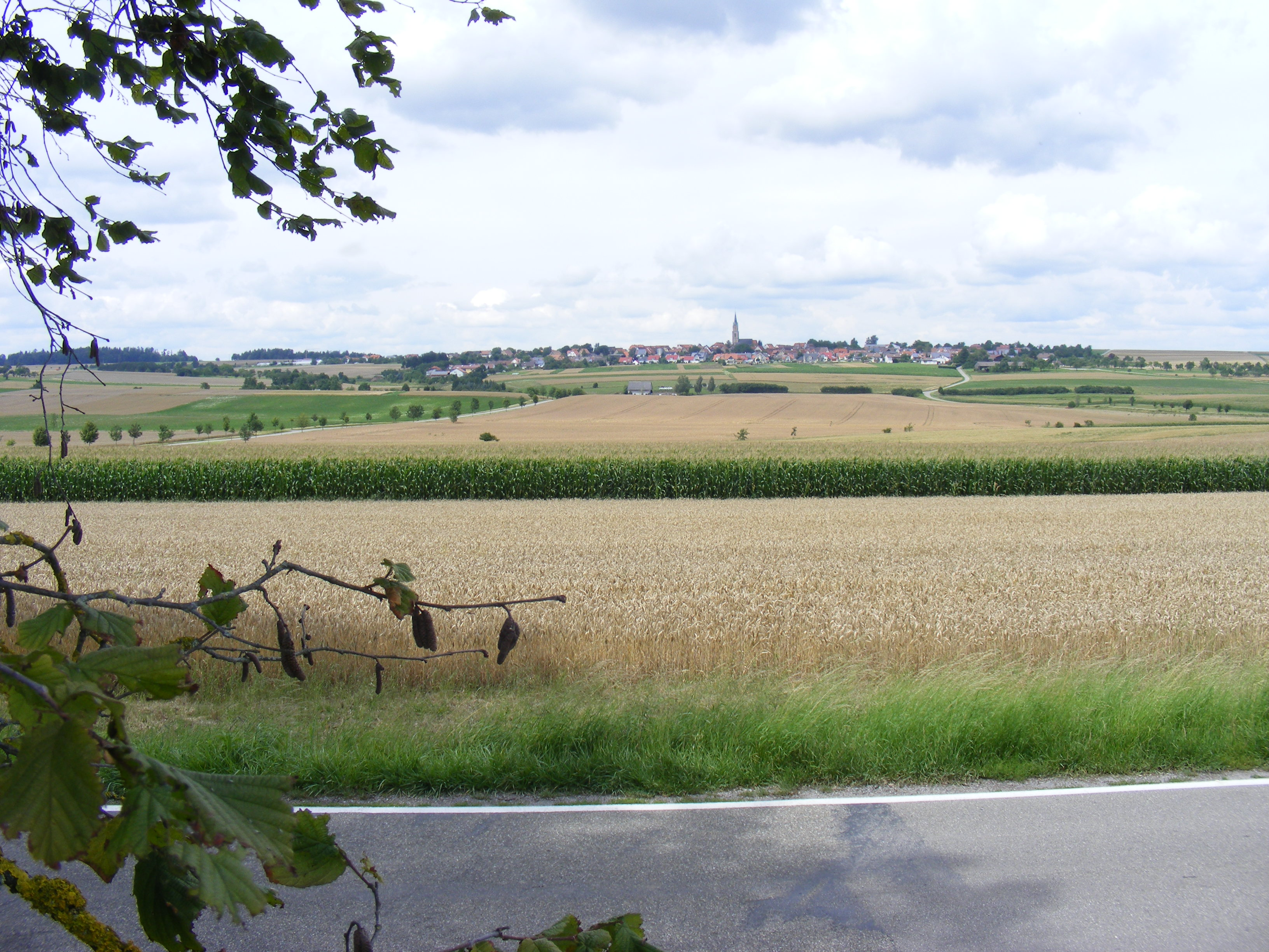 Starzach